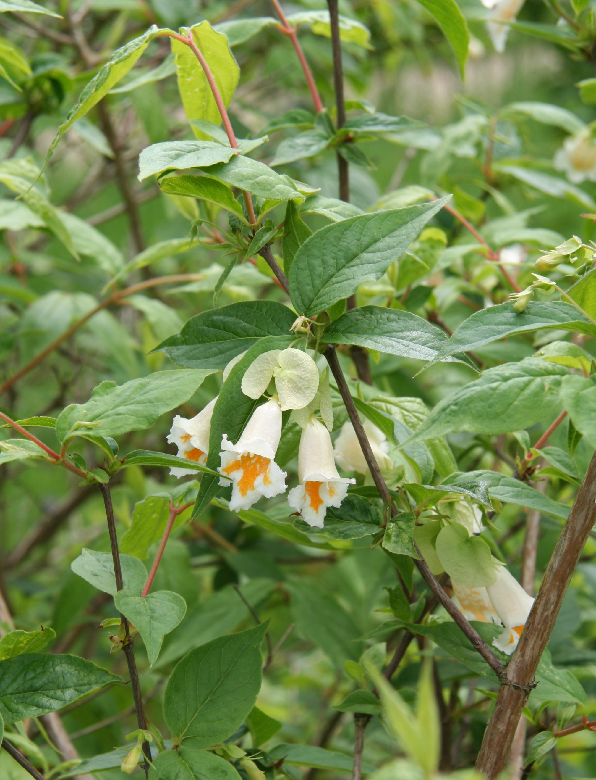 Dipelta ventricosa im Botanischen Garten Dresden